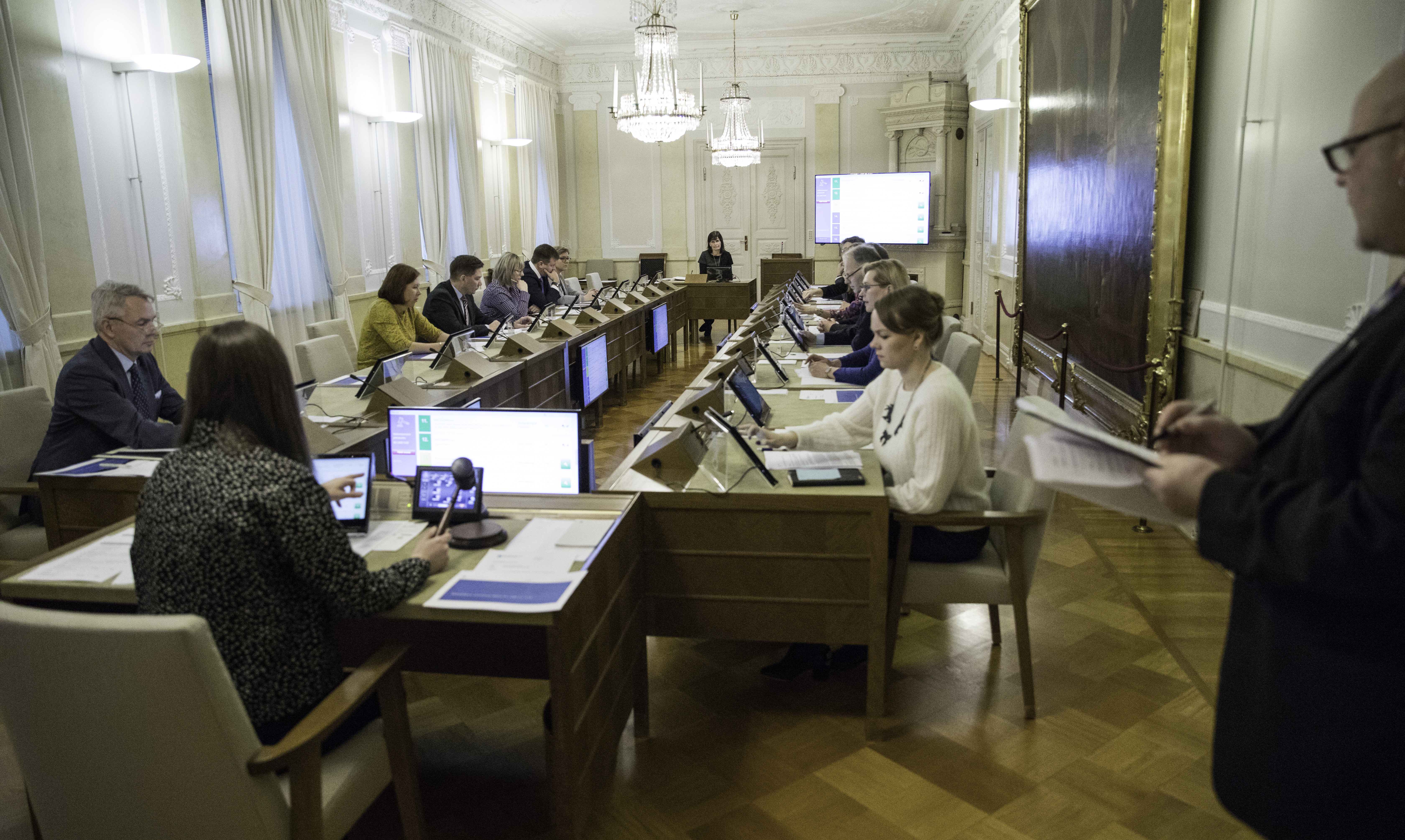 © Lauri Heikkinen | valtioneuvoston kanslia